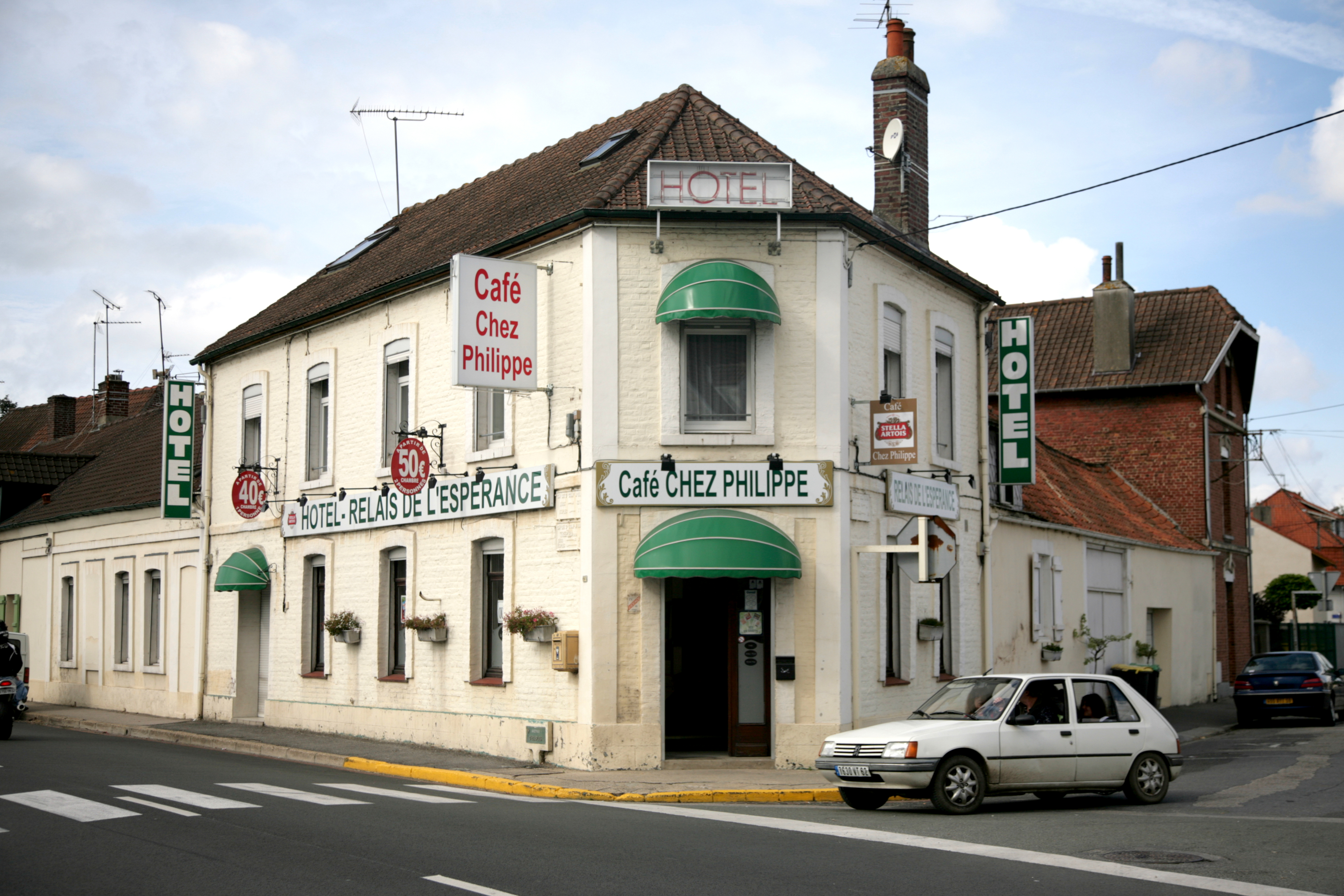 France, Pas-de-Calais, Trépied : architecture commerciale, " chez Philippe "